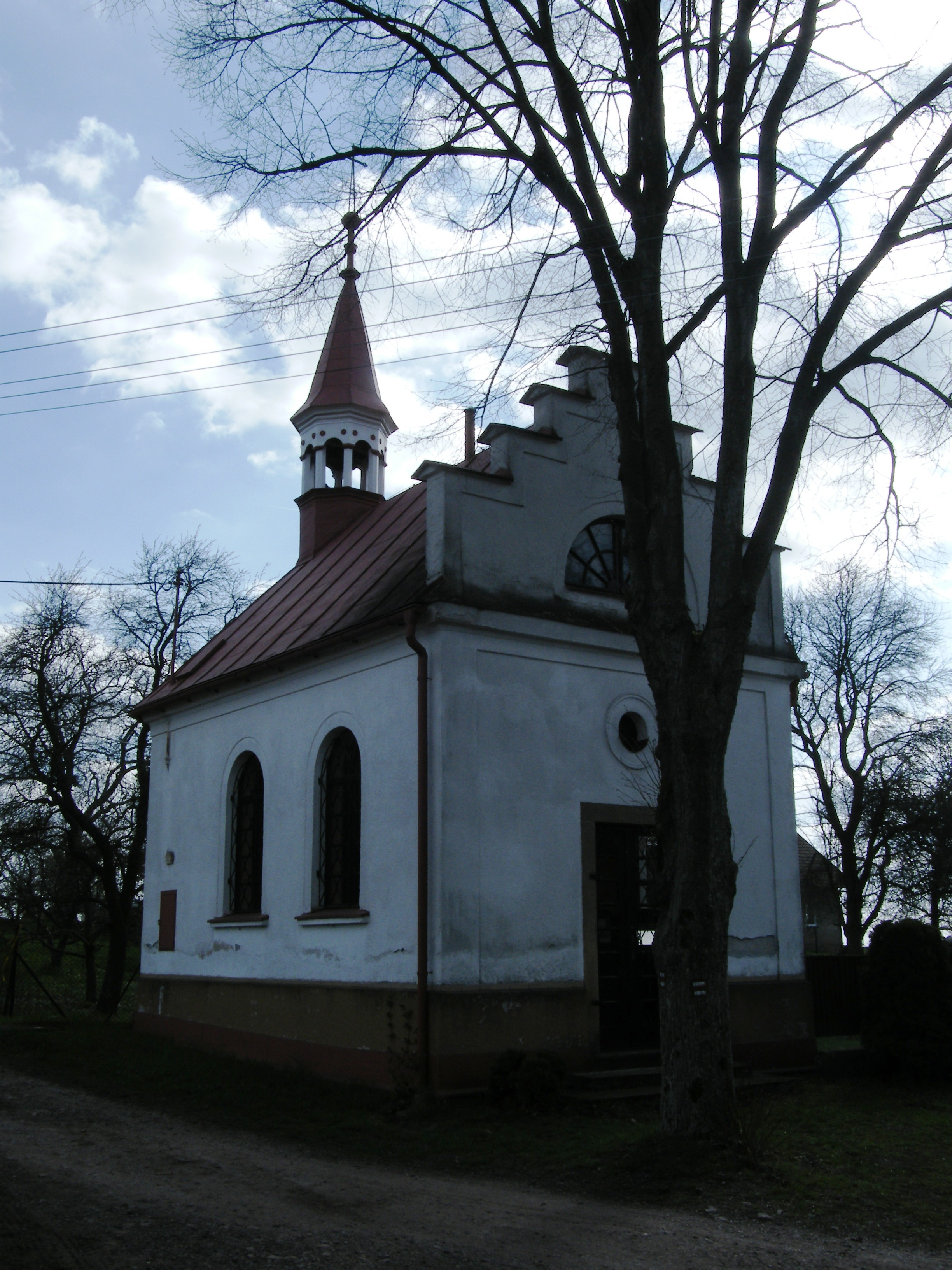 Kaple Panny Marie Lurdské (jizbice)